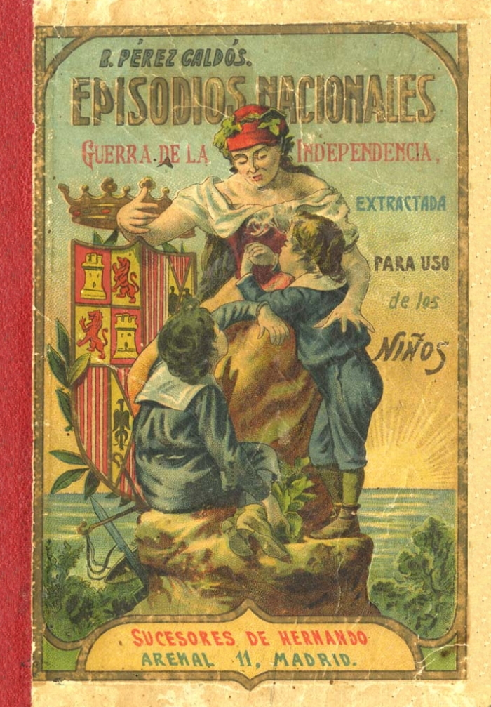 Portada de la primera edición de los Episodios Nacionales para niños del año 1909. Fascículo correspondiente a la Guerra de la Independencia.